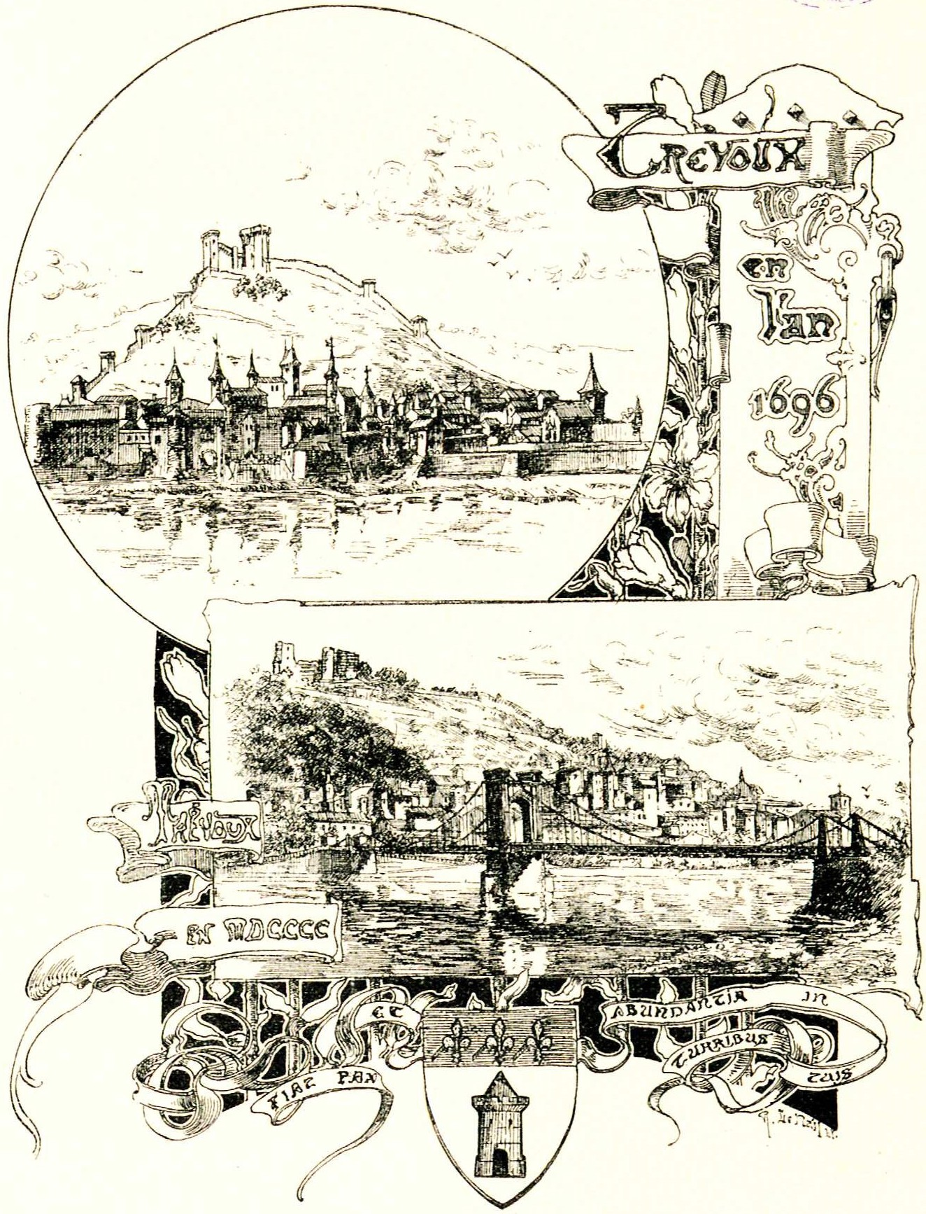 Extrait de P. Lenail, Le Parlement de Dombes, 1900. Vue ancienne reproduite à partir d'un plan dressé par Charles de Neuvéglise.